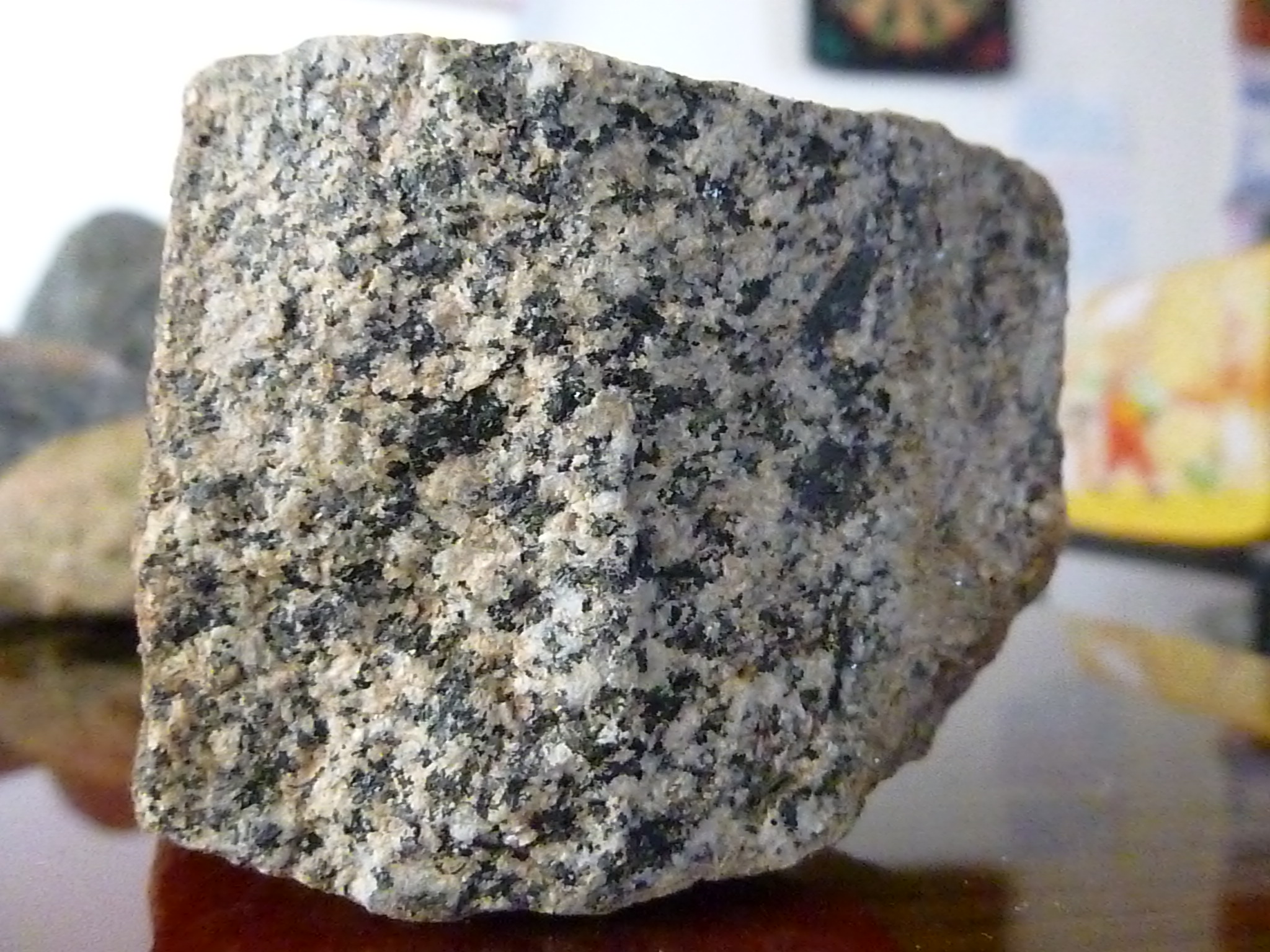 Roca de Granito, Proveniente de el Cerro "Batolito de la Caldera" en Arequipa, Perú